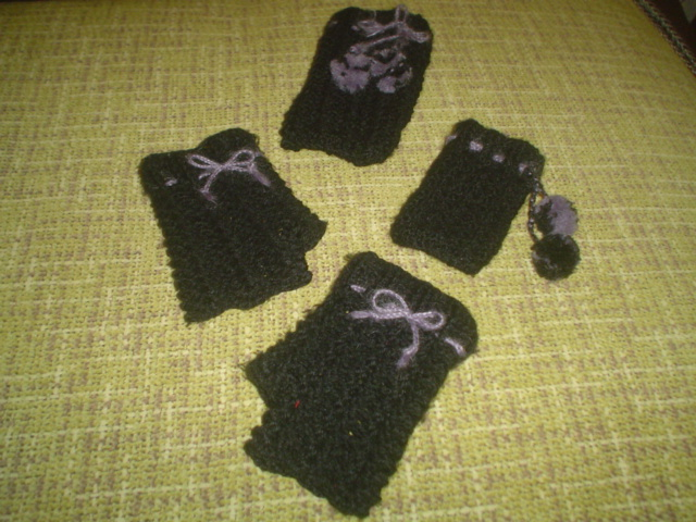 Complementos de ganchillo